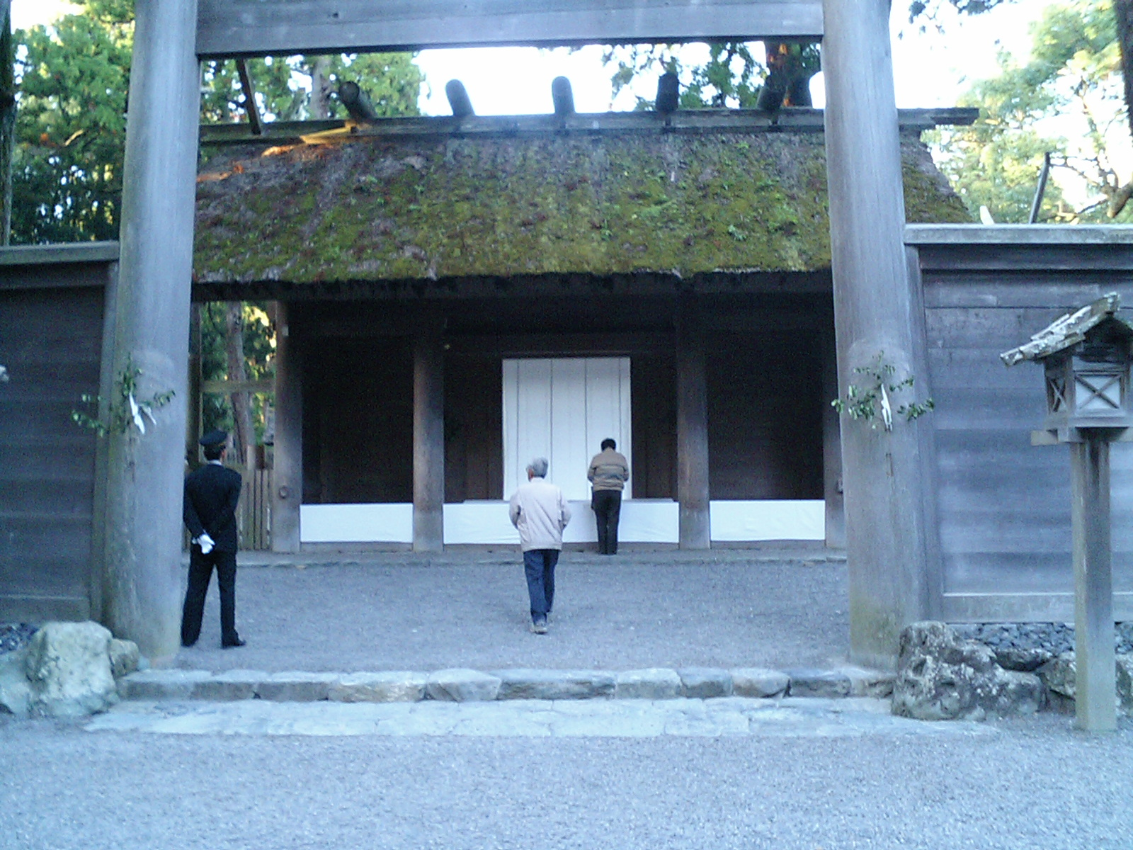 神宮外宮・遙拝所 2005年11月16日に参詣。